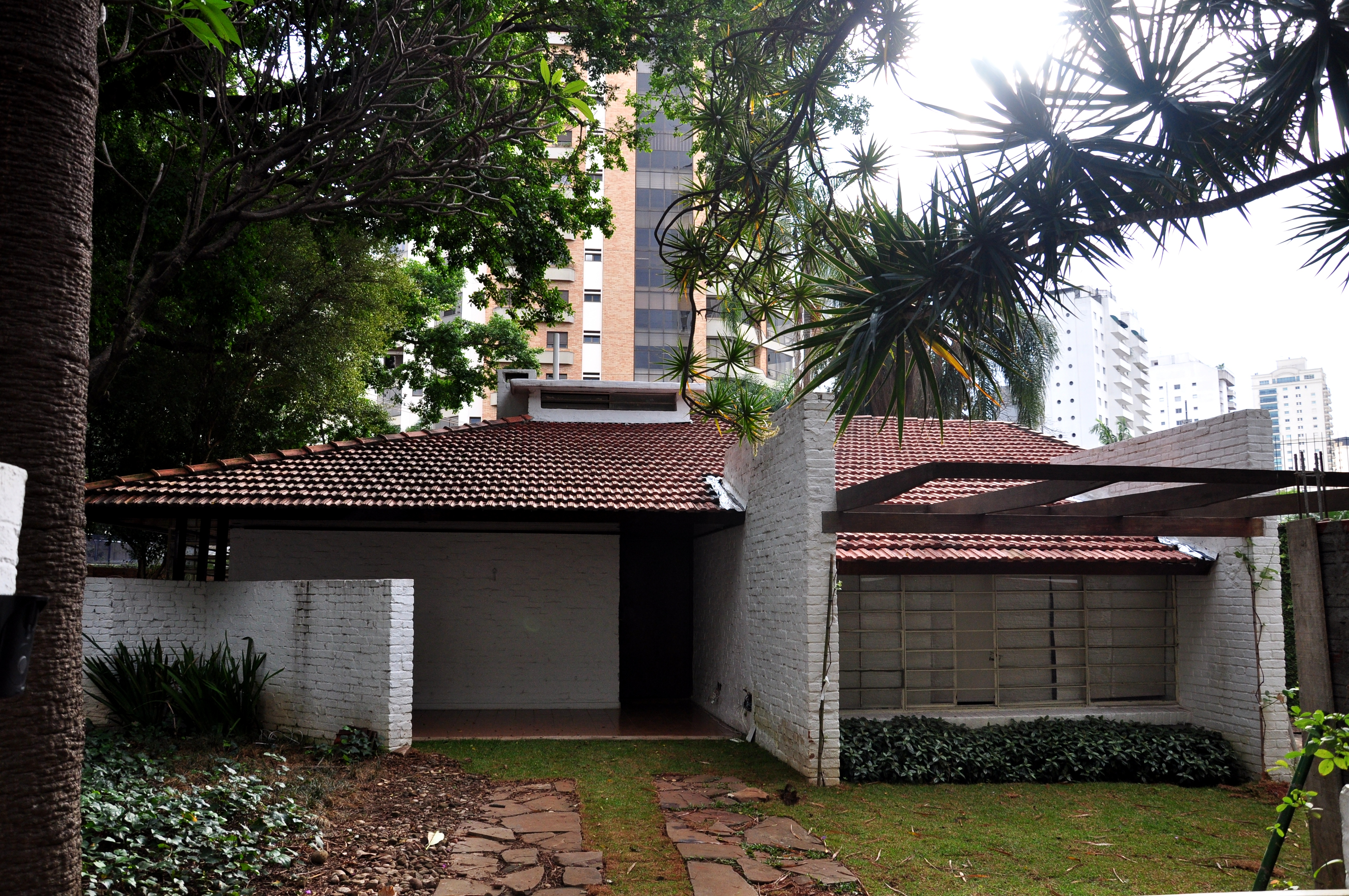 Visão frontal da fachada de uma das construções da Residência Vilanova Artigas II, em São Paulo (SP), Brasil.